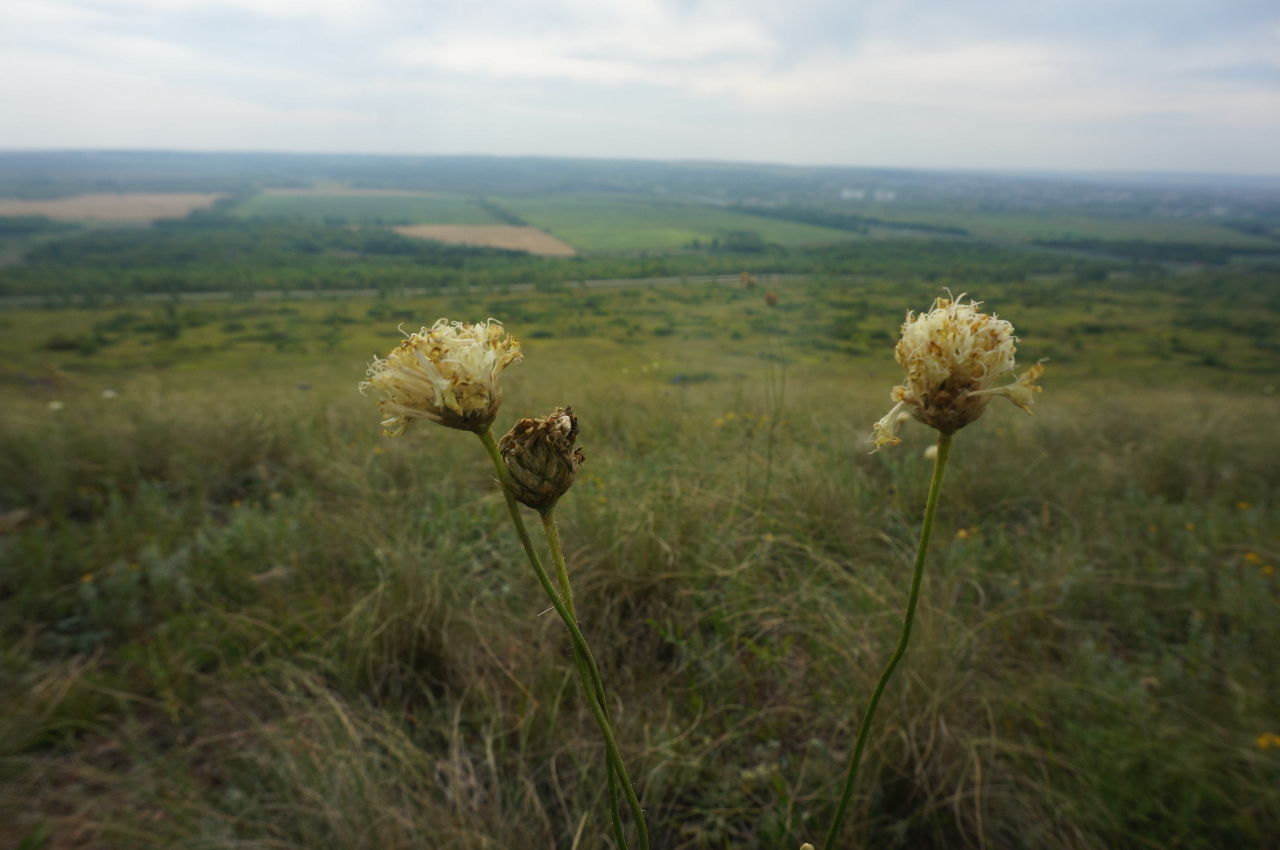 Головчатка уральская в августе. Серноводный шихан, Самарская область, Россия